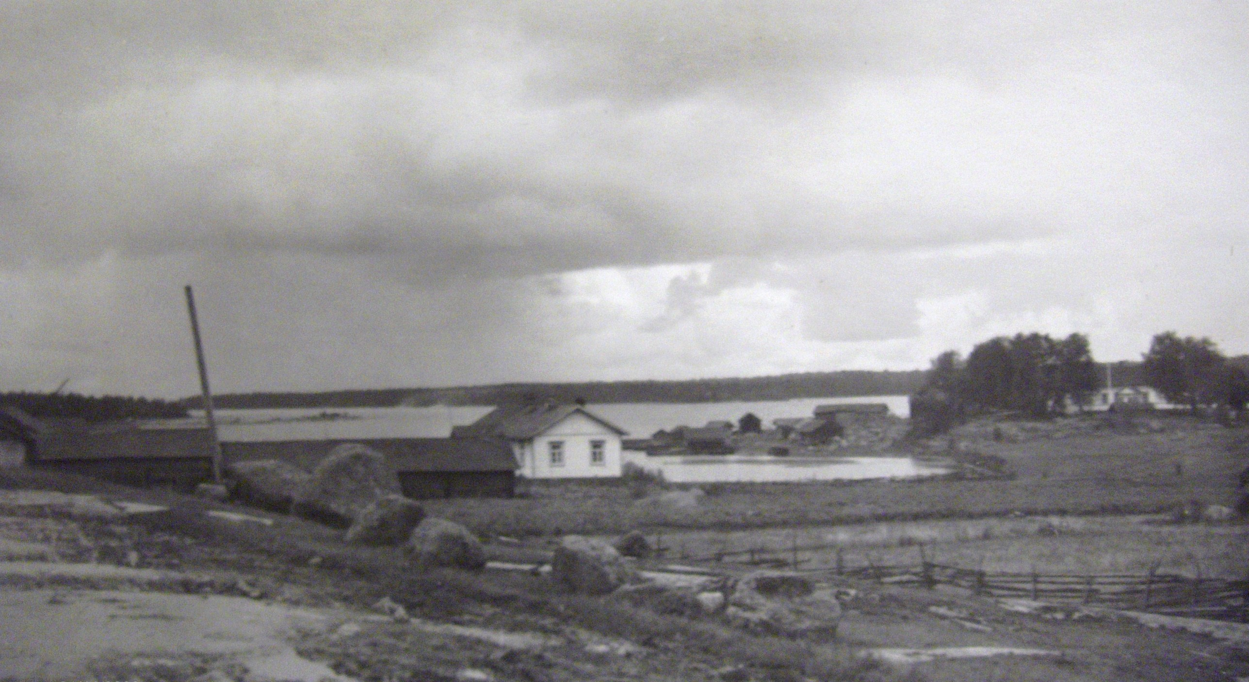 Valokuva omasta albumista